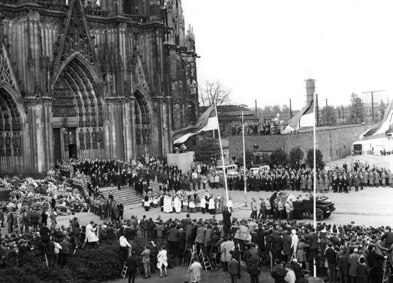 25. April 1967 Staatsbegräbnis für Alt-Bundeskanzler Dr. Konrad Adenauer (1949 - 1963) Vor dem Kölner Dom